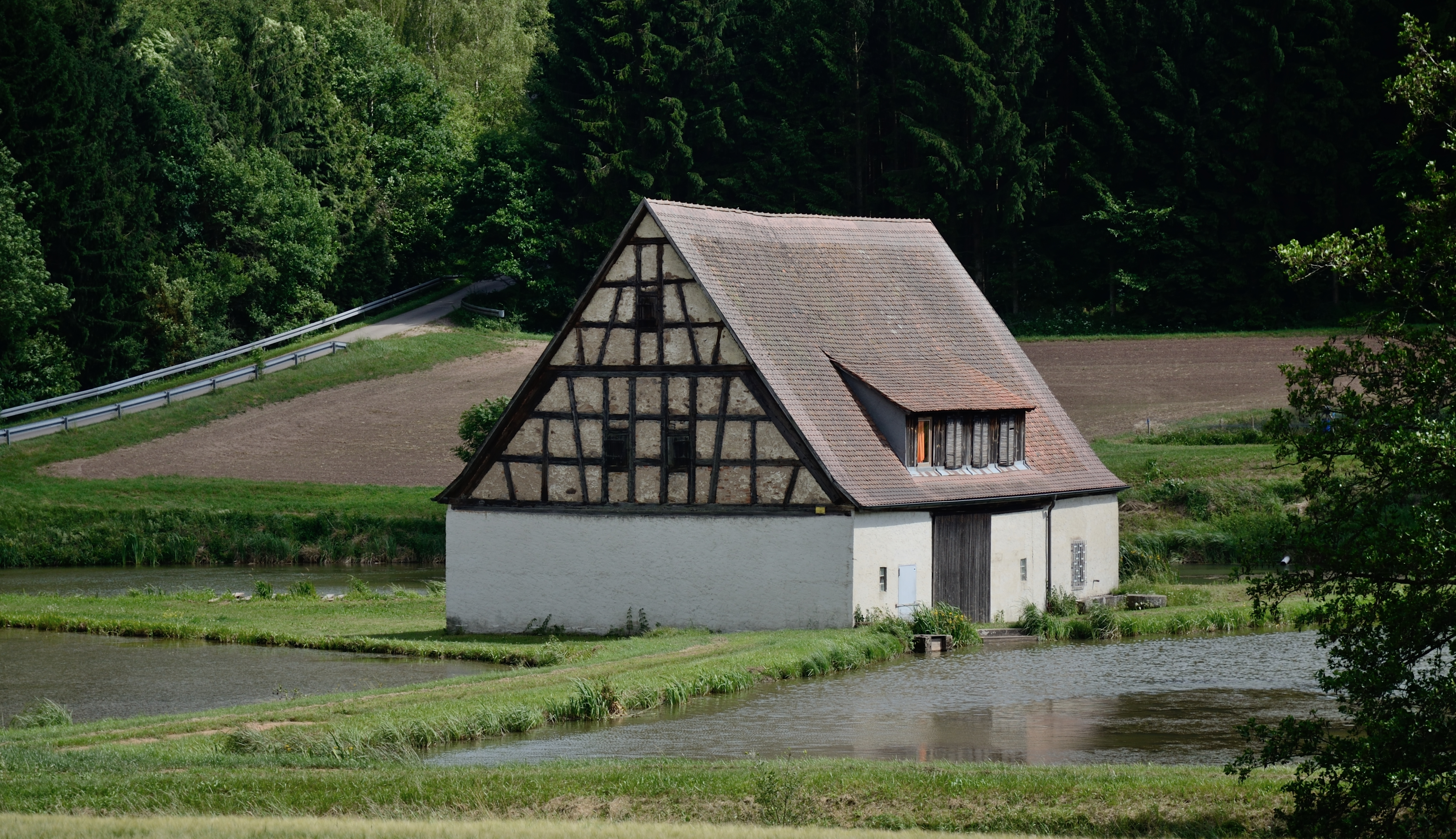 Scheune der in den 1950er Jahren abgerissenen Silbermühle